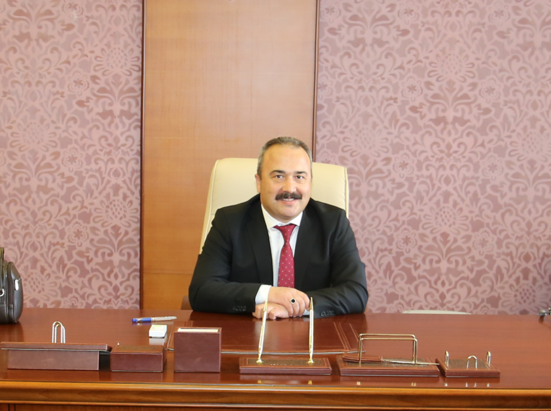 Prof. Dr. Cevdet Coşkun